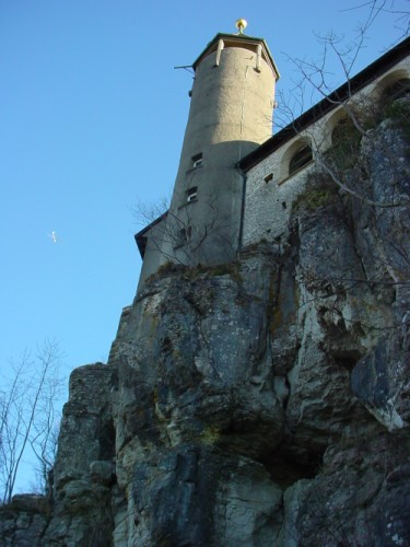 Burg Teck bei Kirchheim unter Teck